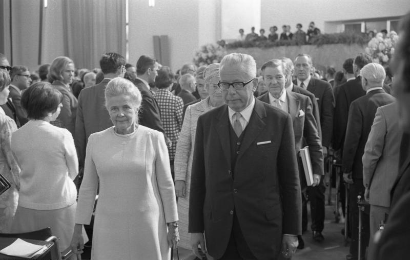 Verleihung des Friedenspreis des Börsenvereins des Deutschen Buchhandels an Gunner und Alva Myrdal (Schweden) in Anwesenheit von Bundespräsident Heinemann in der Frankfurter Paulskirche